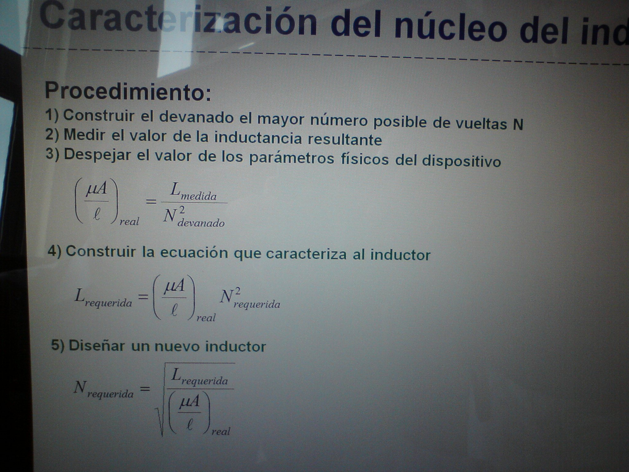 Como carcterizar un nucle toroidal